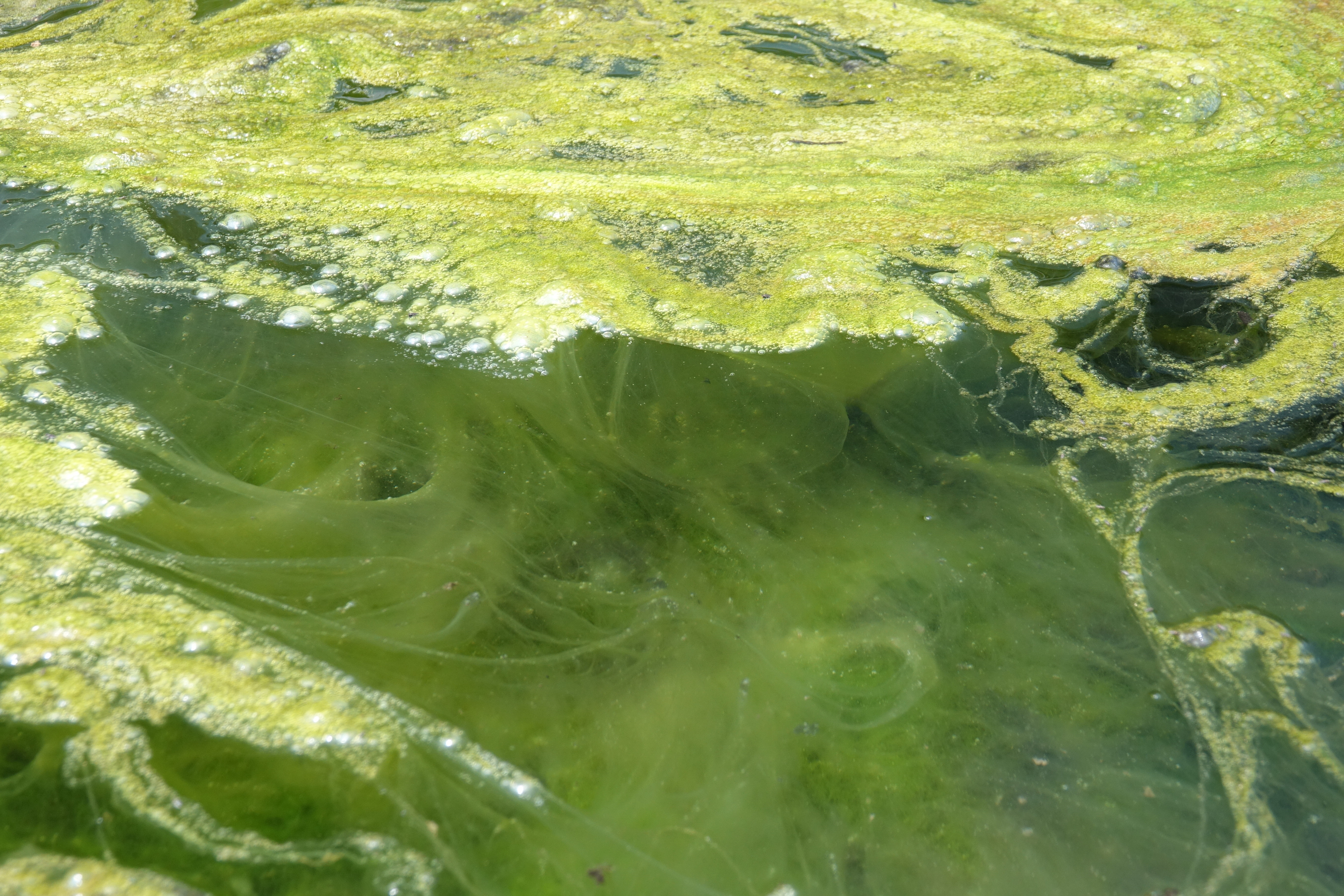 アオミドロの水面と水中 日本東海地方